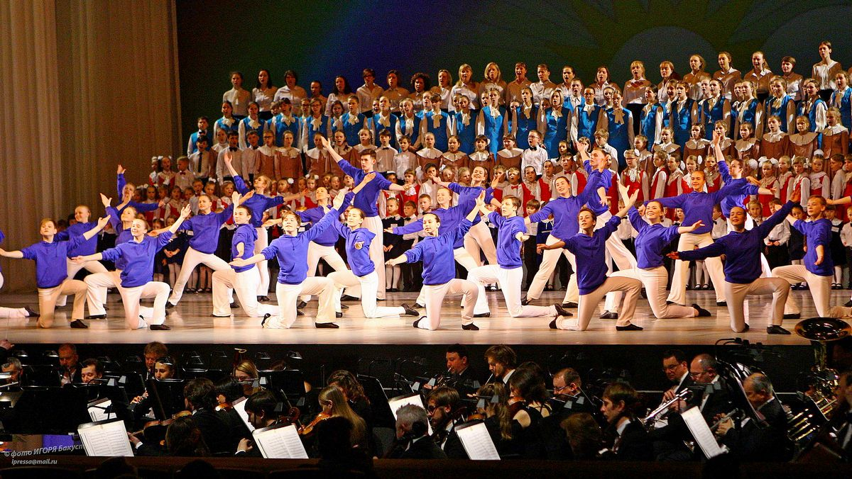 Ансамбль песни и танца им. И.О. Дунаевский